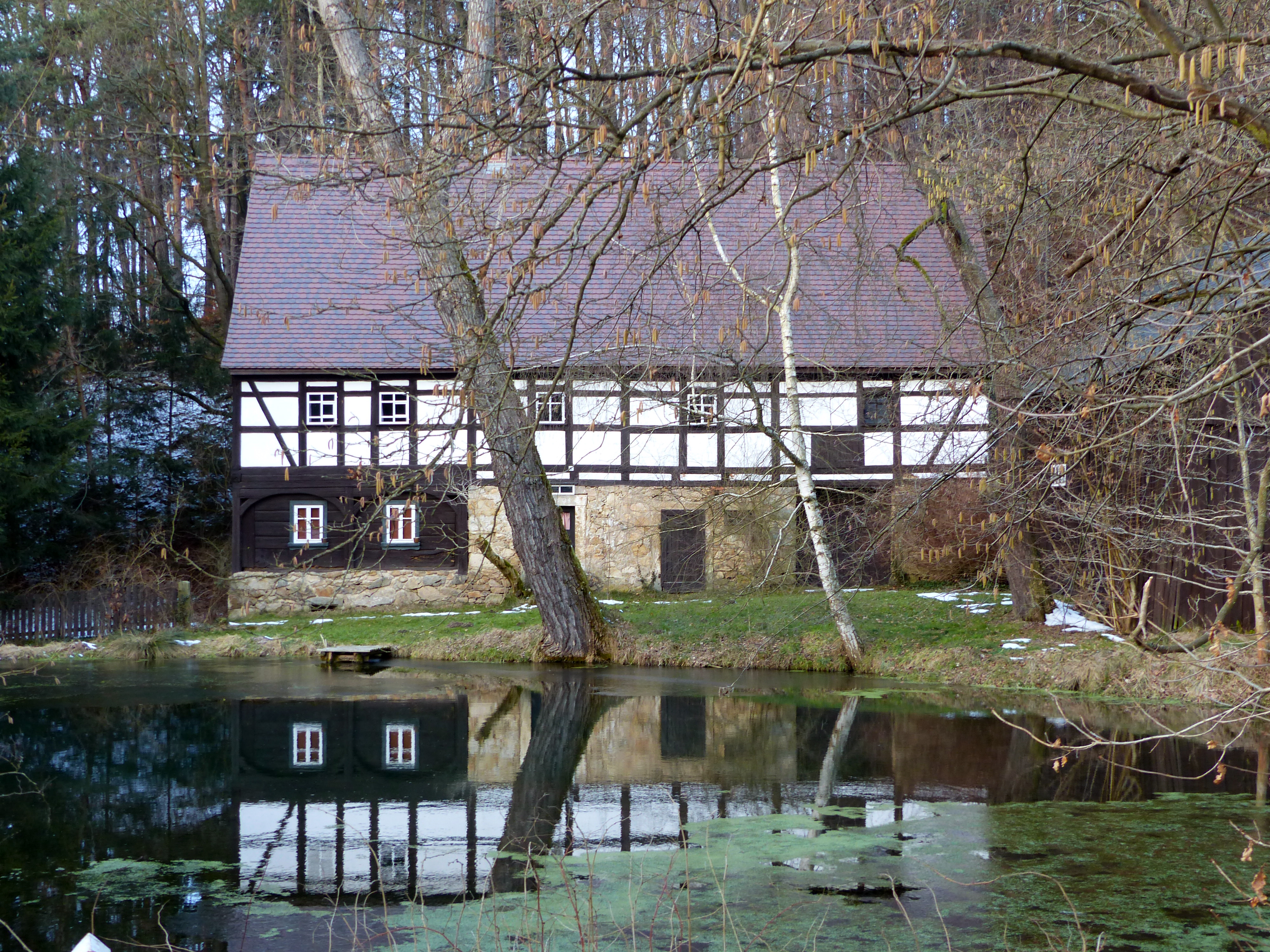 Denkmalgeschütztes Umgebindehaus, Im Polenztal 4, Hohnstein-Cunnersdorf